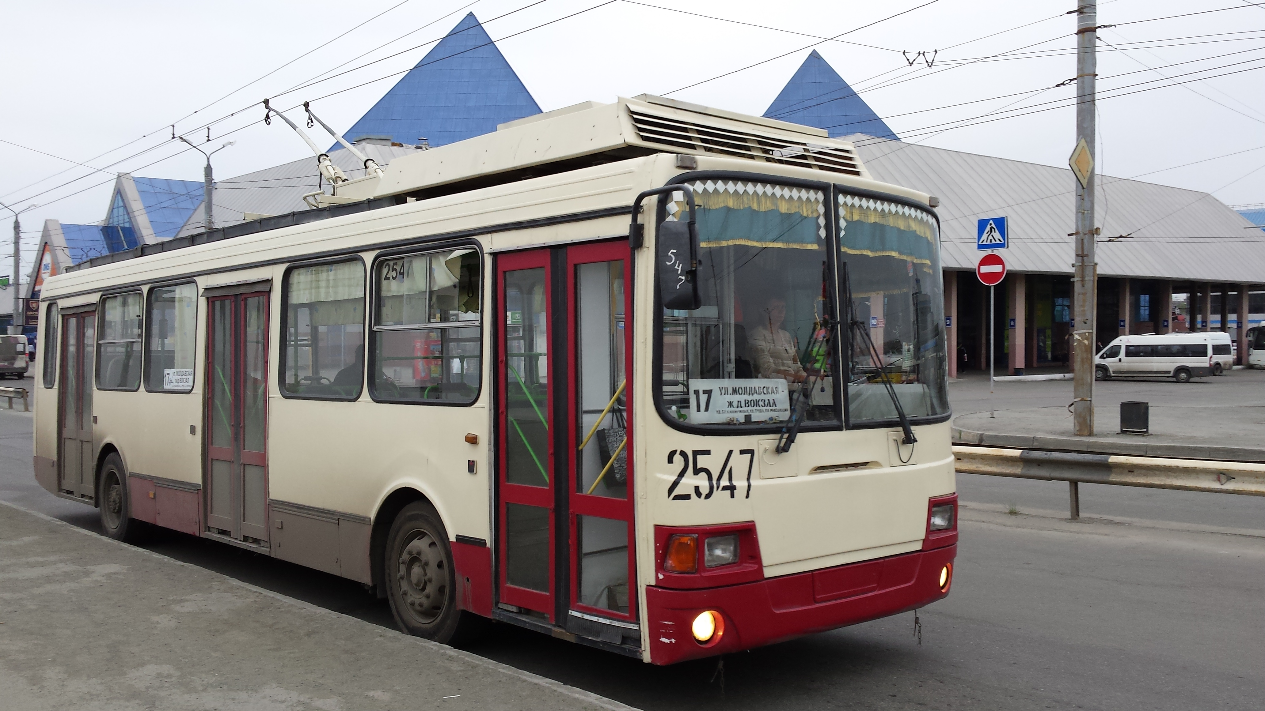 Троллейбус ЛиАЗ-5280 в вишнево-песочной раскраске. Челябинск 2014.